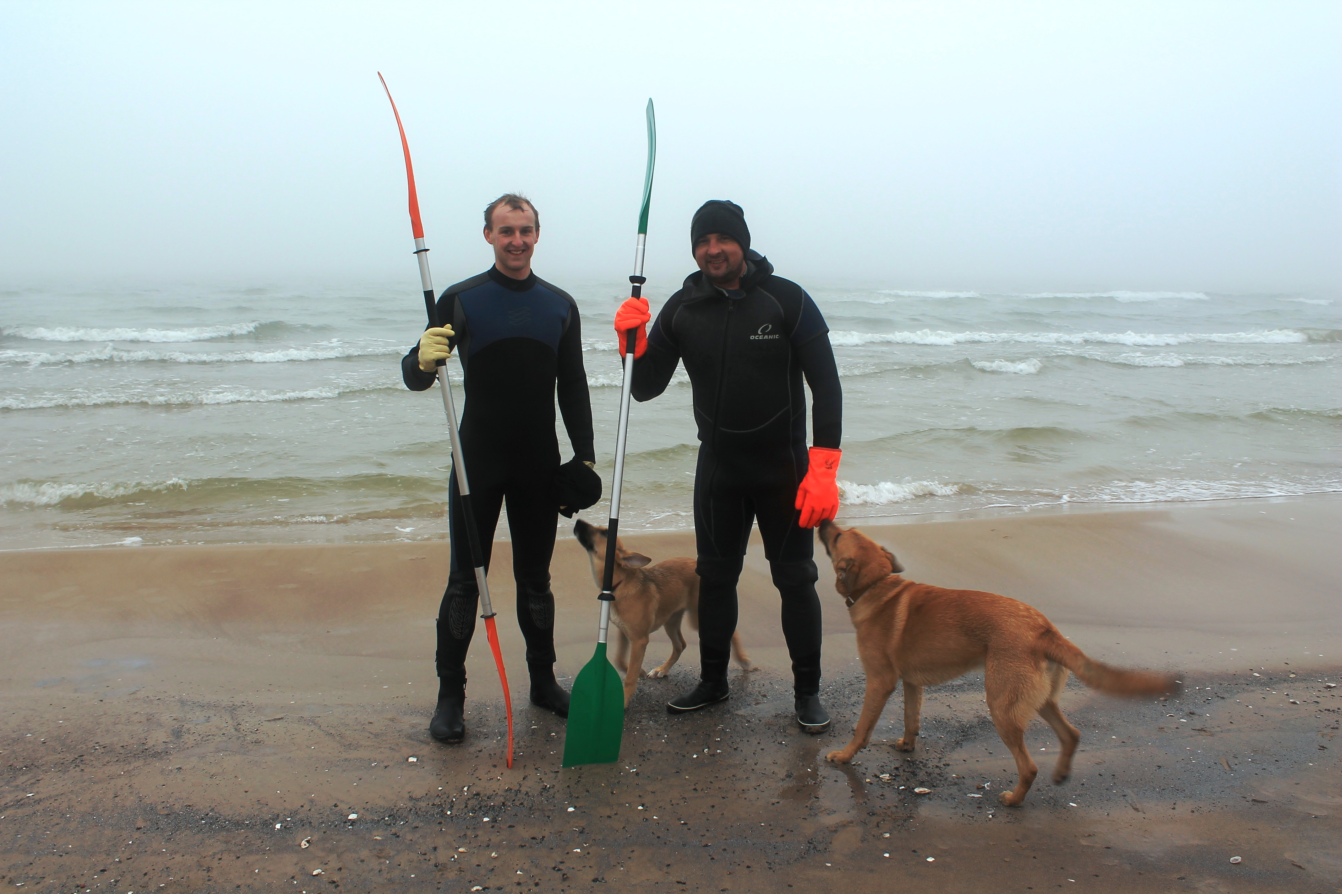 Longe Cōte kustības aizsācēji Latvijā - Mārtiņš Finks & Turaids Šēfers